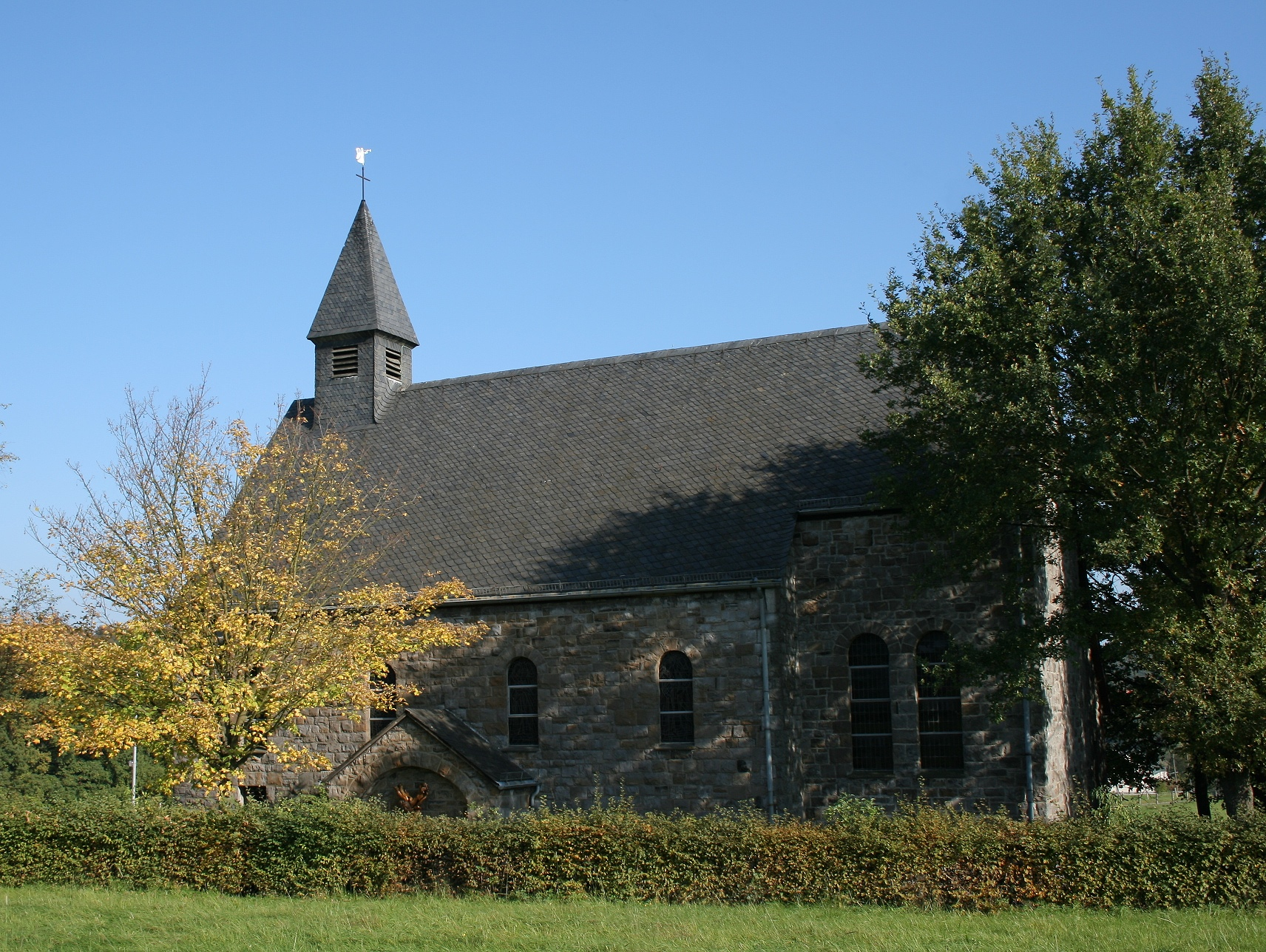 Kapelle St. Hubertus im Mendener Ortsteil Lürbke.